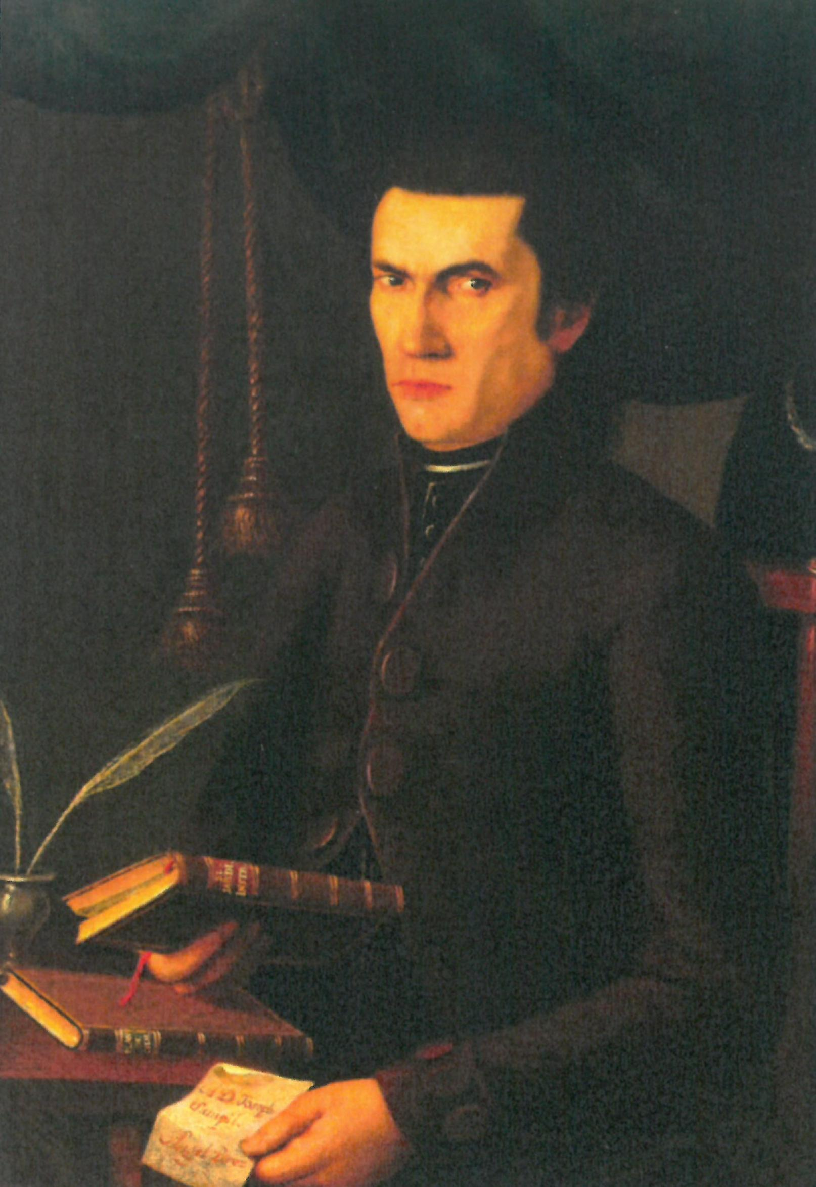 Retrato José Antonio Sampil Labiades